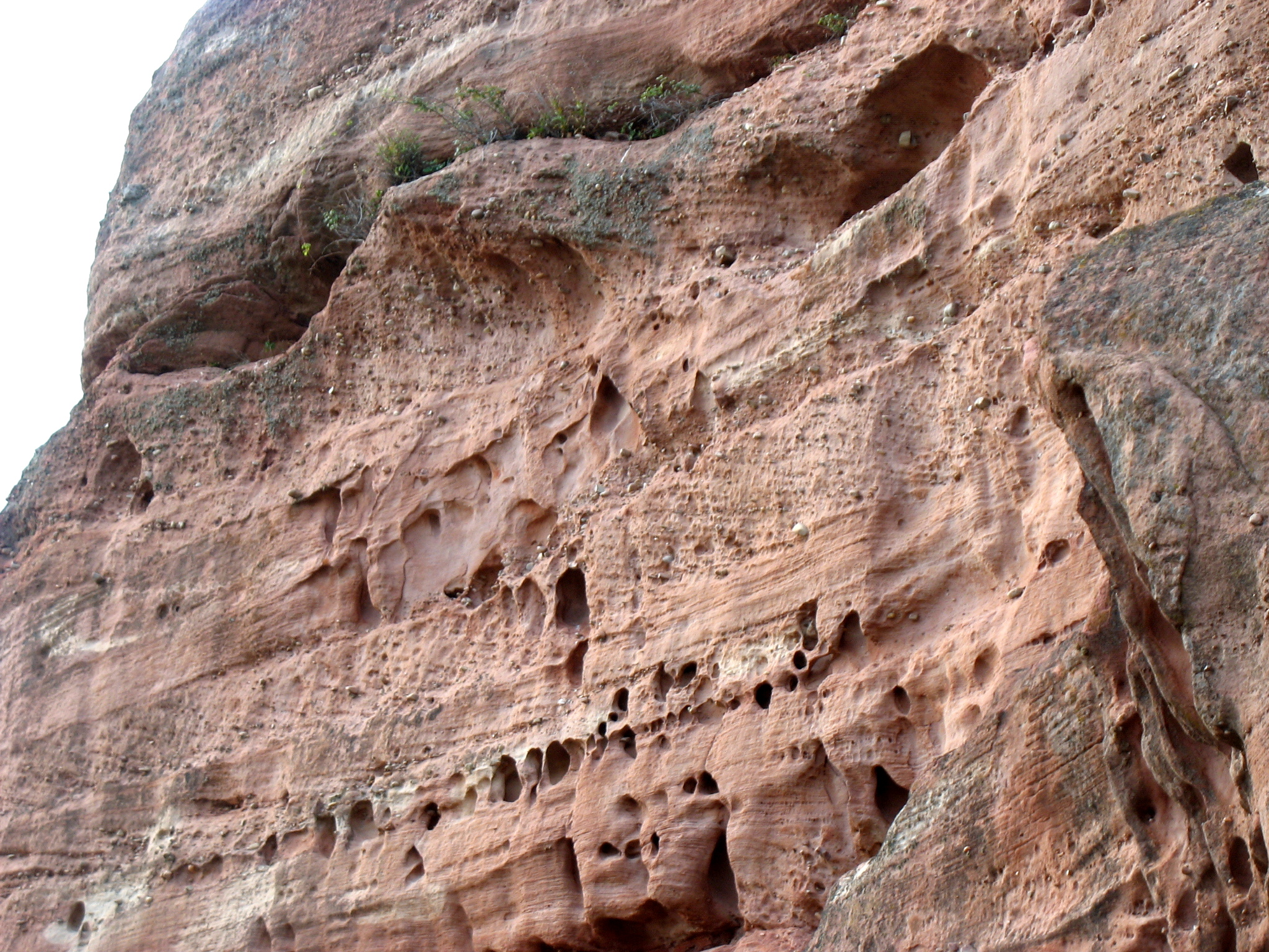 Buntsandstein (Triásico), estratificación cruzada - Tiermes, Soria